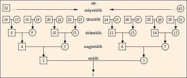 Karl von Stephan Kekulé Stradonitz megalkotta a róla elnevezett felmenői számozási szisztémát, melyet a nemzetközi szakirodalom Sosa - Stradonitz System néven ismer. Ezt a szisztémát ábrázolja a kép. A képhez fűzött magyarázatot lásd a Wikipédiában Kekulé számozási szisztéma fájlban.